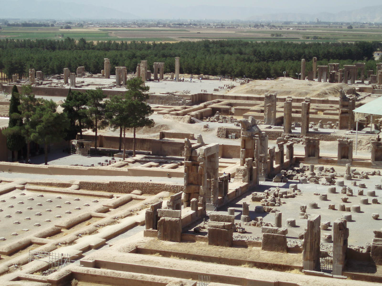 Iran 2007 089 Persepolis